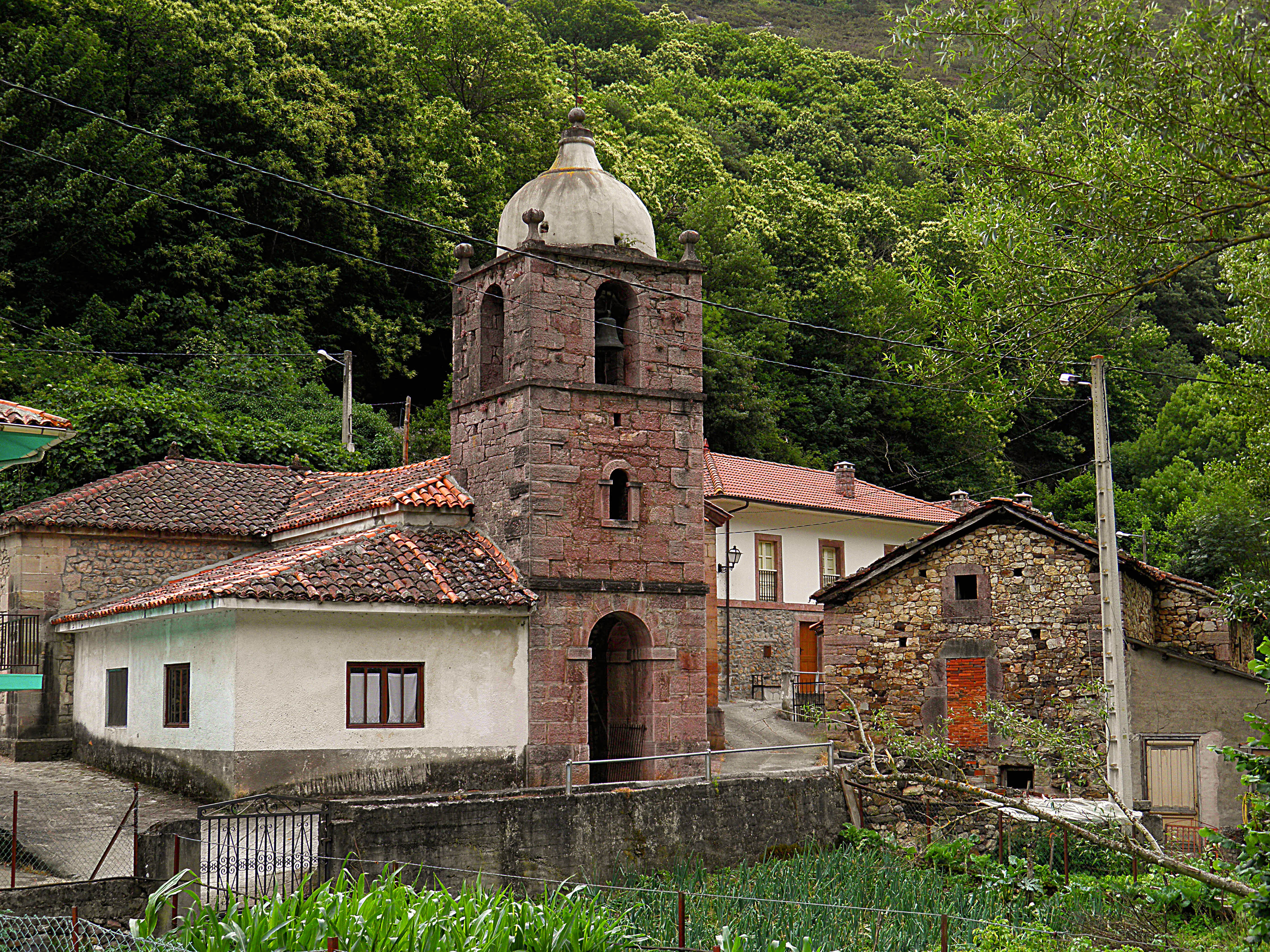 La Riera (Somiedo, Asturias)